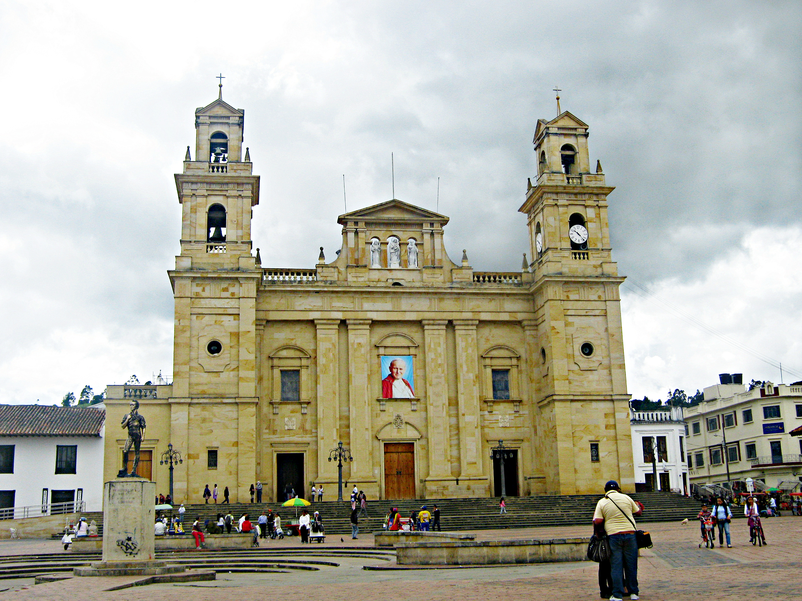 Fachada de la Basílica de Chiquinquirá